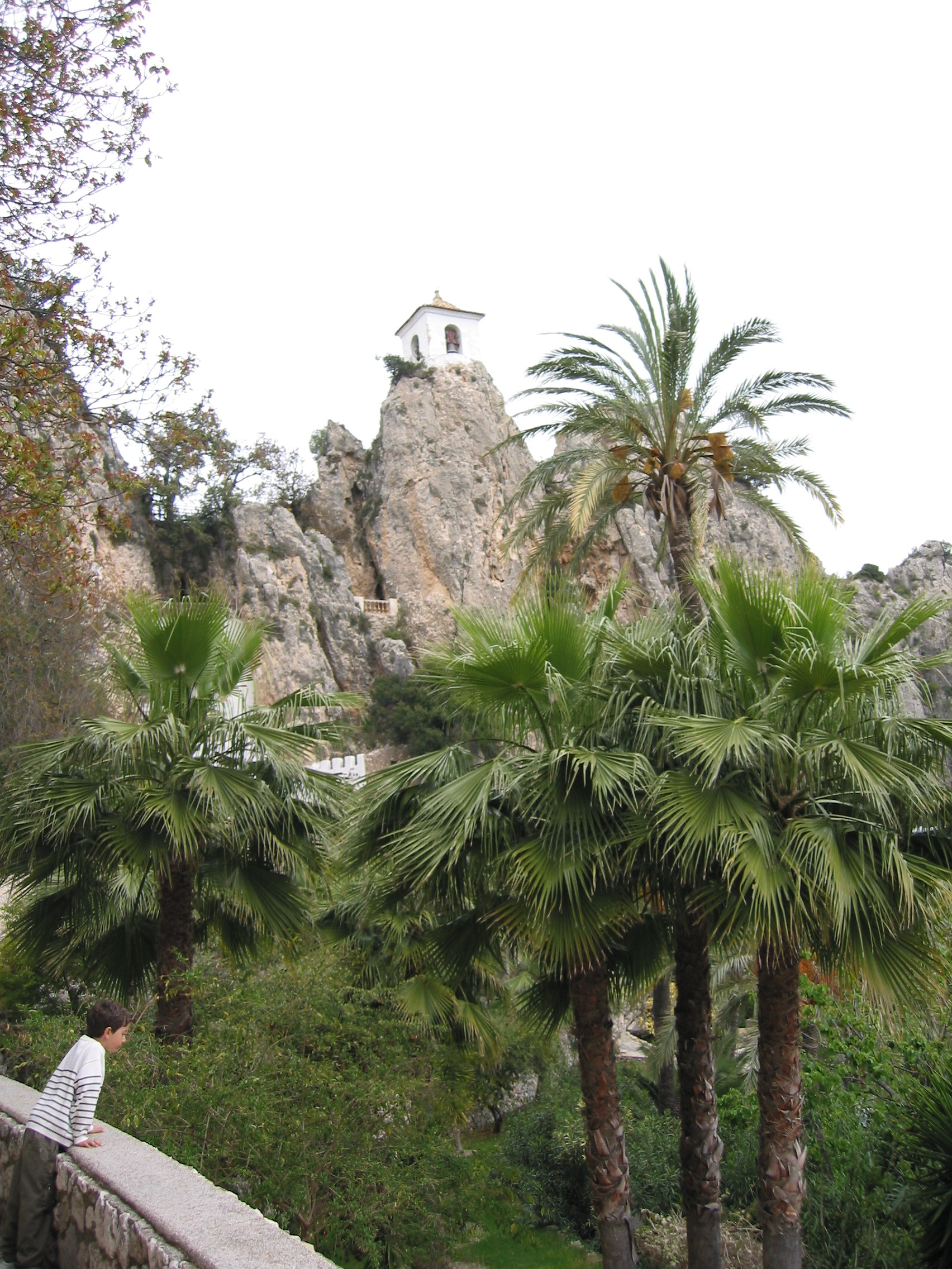 Guadalest